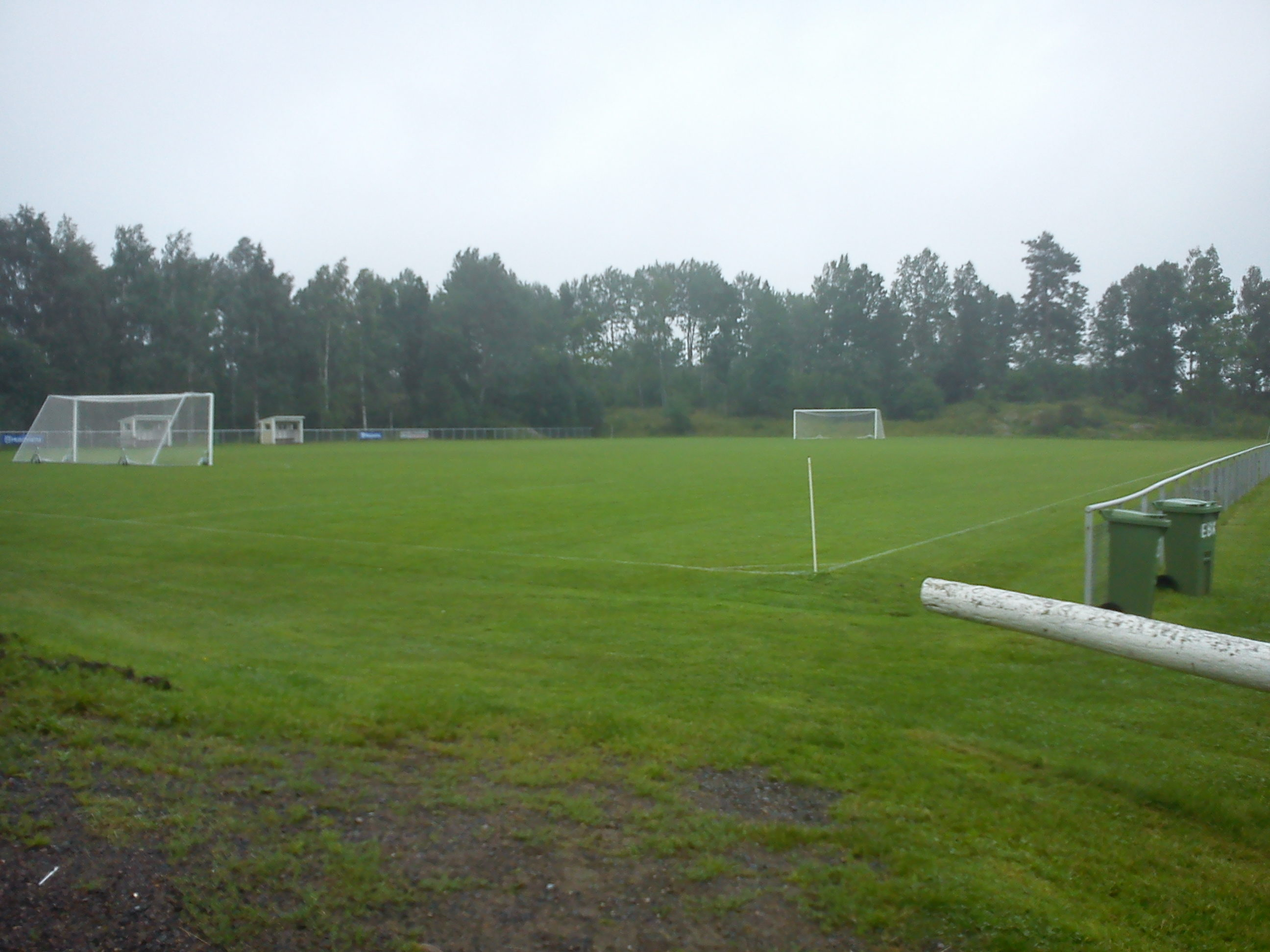 Fotbollsplan på EBK